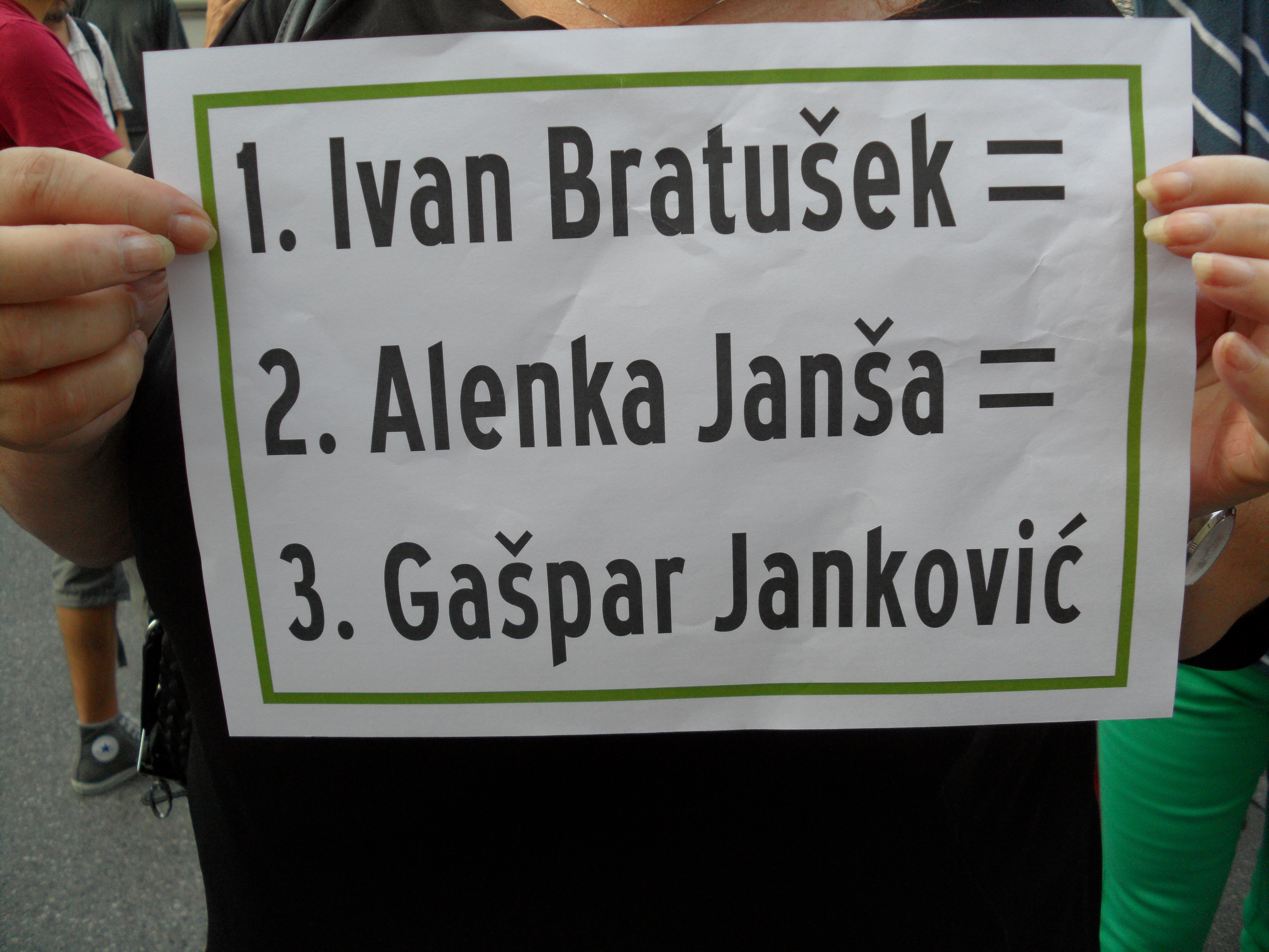 Shod proti vladi, koruptivnemu kadrovanju v državnih in občinskih podjetjih ter proti imenovanju Gašparja Gašparja Mišiča na čelo Luke Koper je pod sloganom "NE političnemu kadrovanju in NE tajkunsko-političnim-bančnim bandam" potekal v četrtek, 5. 9. 2013, tokrat po posredovanju Gregorja Viranta brez ograd in policijskih kordonov pred državnim zborom in vladnim poslopjem. Shod je pripravilo in podprlo devet vstajniških in civilnodružbenih gibanj. Protestniki so se s Trga republike podali na pohod čez Ljubljano. Sprehodili so se tudi mimo ameriškega veleposlaništva, kjer je bilo slišati vzklike proti vojaškemu posredovanju v Siriji. Protestniki so se nato ustavili pred vladnim poslopjem, kjer so mdr. spregovorili Julijana Zimic (gibanje VLV) ter Lara Valič in Matjaž Hanžek (stranka TRS). Med drugim so protestniki pred vladnim poslopjem zahtevali, da se sprejmejo ukrepi za omejevanje sistemske korupcije, ukinitev vseh brezpredmetnih svetov in komisij, omejitev interesnih skupin, kadrovanje po sposobnostih in znanju ter zakonsko podlago za vračanje v tranziciji protipravno pridobljenega premoženja. Po njihovem mnenju vlada Alenke Bratušek nima moči, da bi njihove zahteve uresničila, zato zahtevajo njen odstop in oblikovanje prehodne vlade, ki bo sposobna izvesti nujne ukrepe proti korupciji, klientelizmu in gospodarsko stabilizirala državo ter jo pripeljala do predčasnih državnozborskih volitev. Vodja VLV Uroš Lubej je za medije izjavil, da vstajniška gibanja načrtujejo novo, 6. vseslovensko vstajo v oktobru 2013.